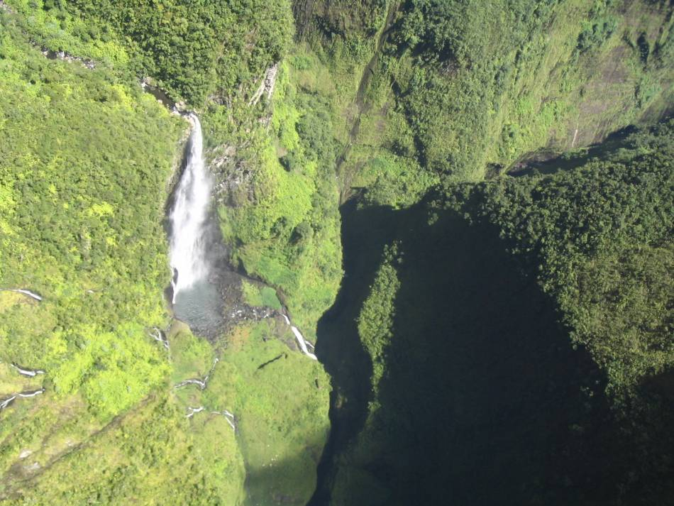 Photo prise par Nerijp le 23 novembre 2004. Elle est libre de droit d'après cette page.